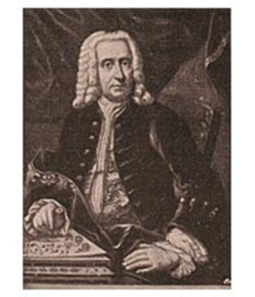 Johann Heinrich Schulze